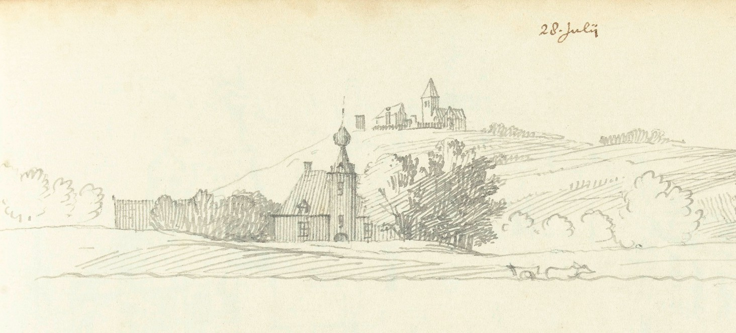 Zeichnung mit einer Ansicht des Schlößchens Borghees in Emmerich-Borghees